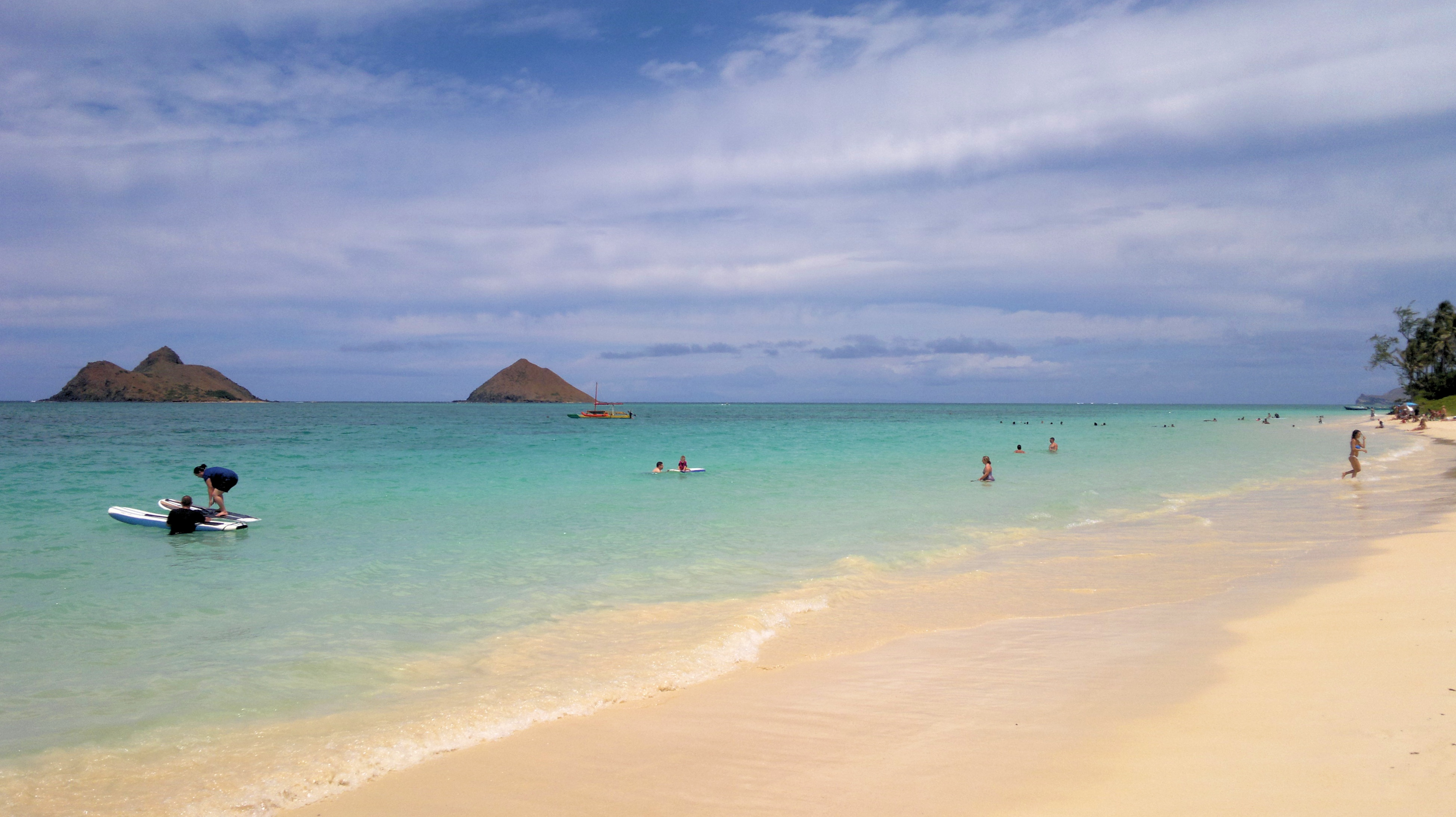 Der Strand Lanikai an der Ostküste Oahus.